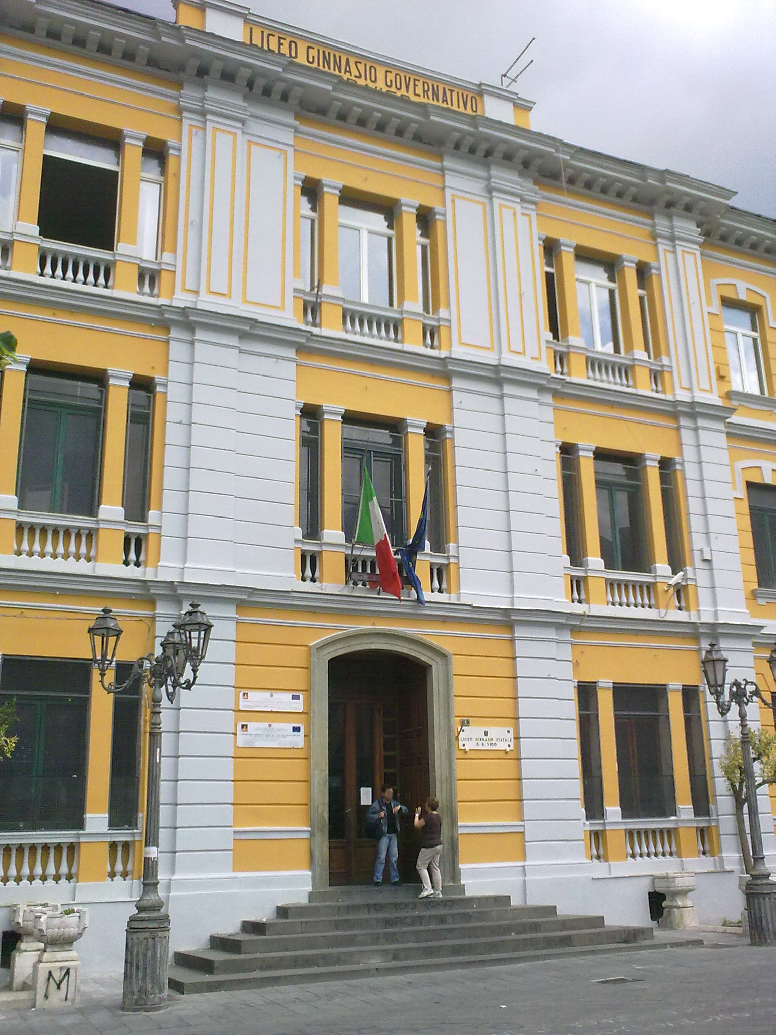 Facciata del palazzo del Liceo Classico di Nocera Inferiore